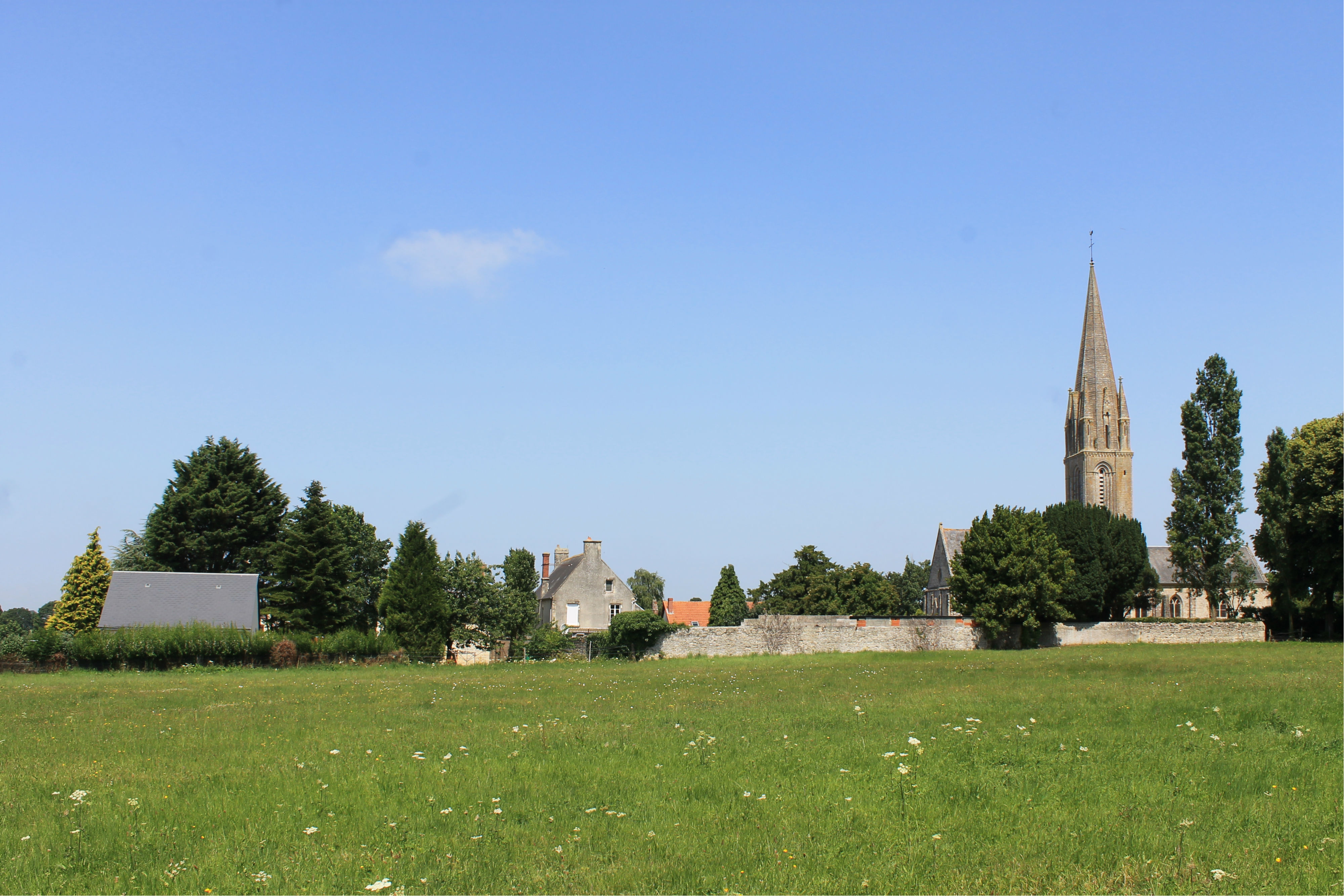 Ducy-Sainte-Marguerite (Calvados)